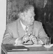 Carl Arnold Willemsen alle prime Giornate normanno-sveve a Bari 1975